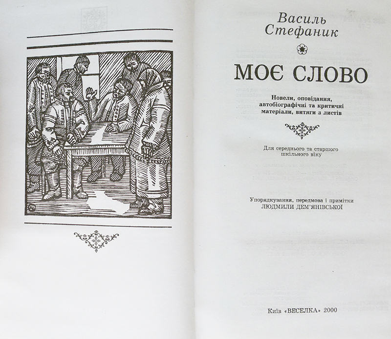 Ілюстратор - Іван Іванович Литвин, ксилографія, 1972, 2000 рр.